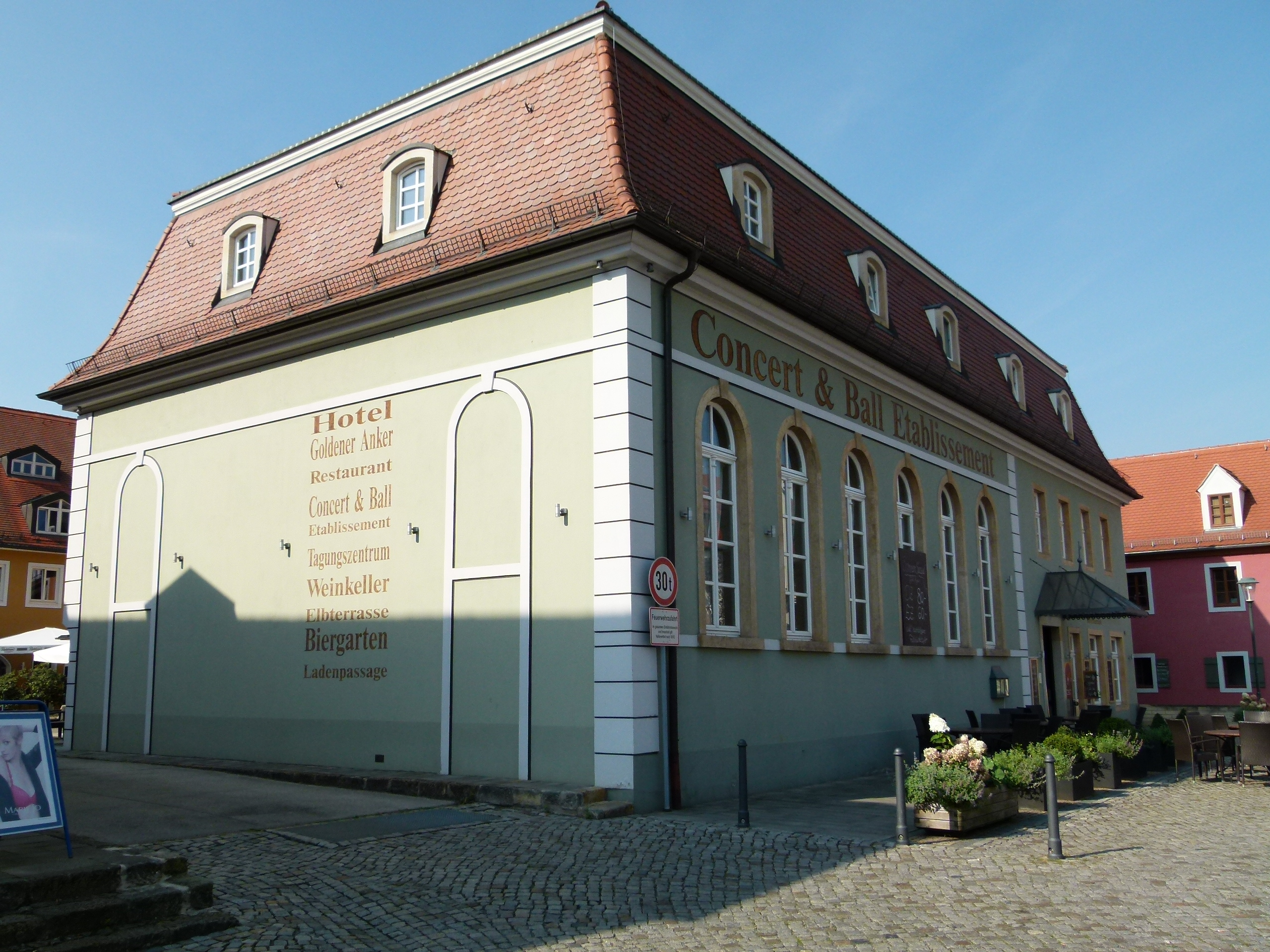 Denkmalgeschütztes Haus, Altkötzschenbroda 61, Radebeul, Sachsen